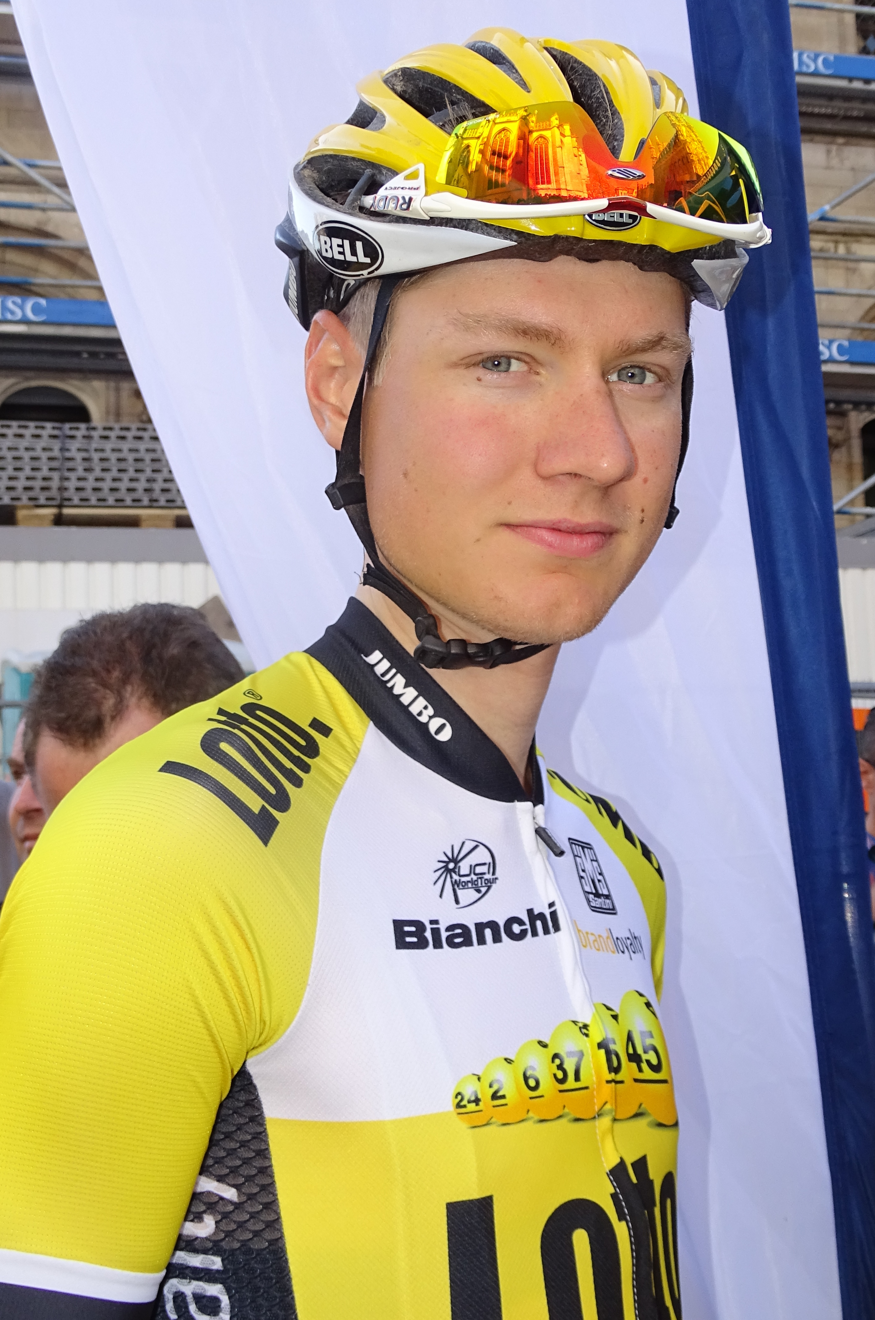 Reportage réalisé le mercredi 15 avril à l'occasion du départ de la Flèche brabançonne 2015 à Louvain, Belgique.